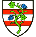 Wappen von Bad Hönningen